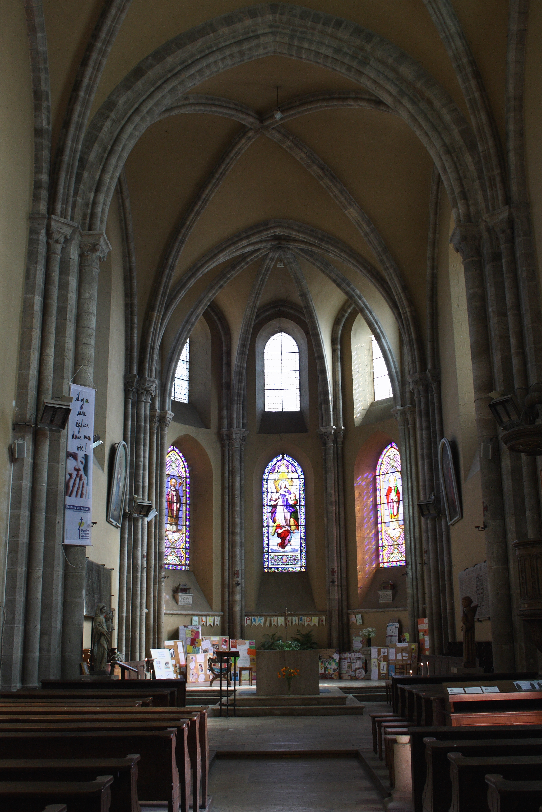 Katholische Pfarrkirche Saint-Clair-Saint-Léger in Souppes-sur-Loing im Département Seine-et-Marne in der Region Île-de-France (Frankreich), Innenraum mit Blick zum Chor